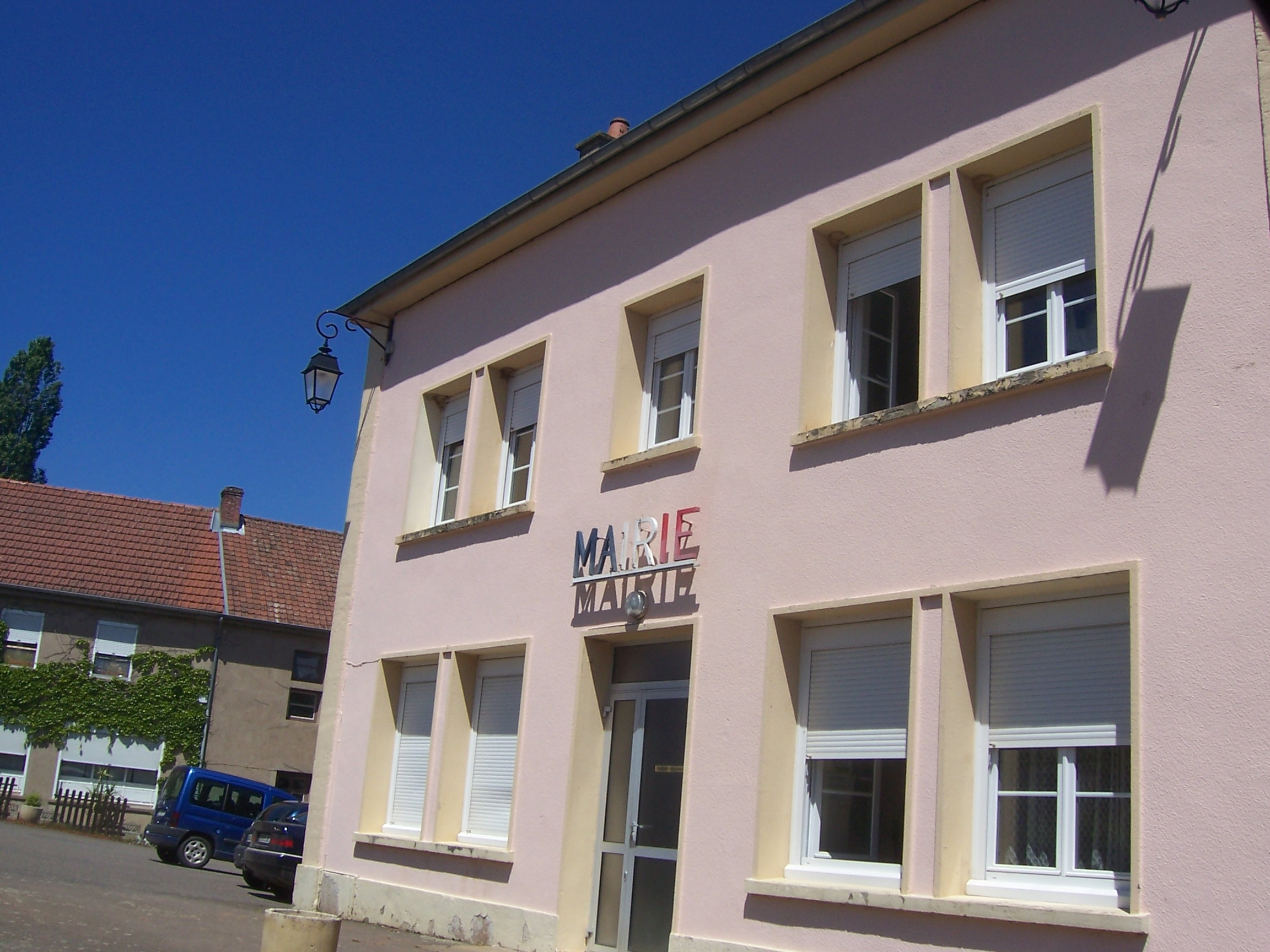 Mairie d'Antully